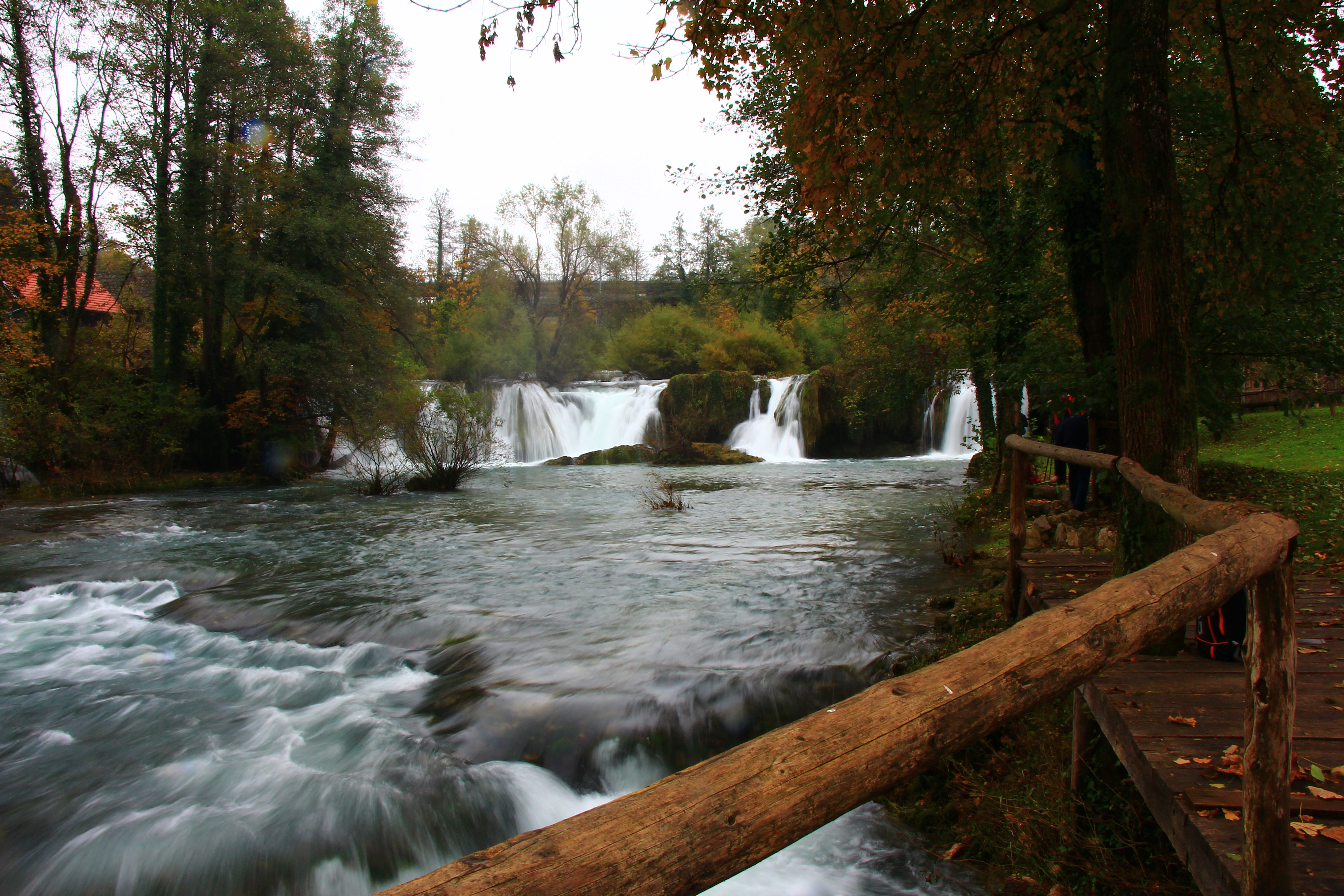 Rastoke mit seinen Wasserfälllen, Teil der Stadt Slunj in Kroatien